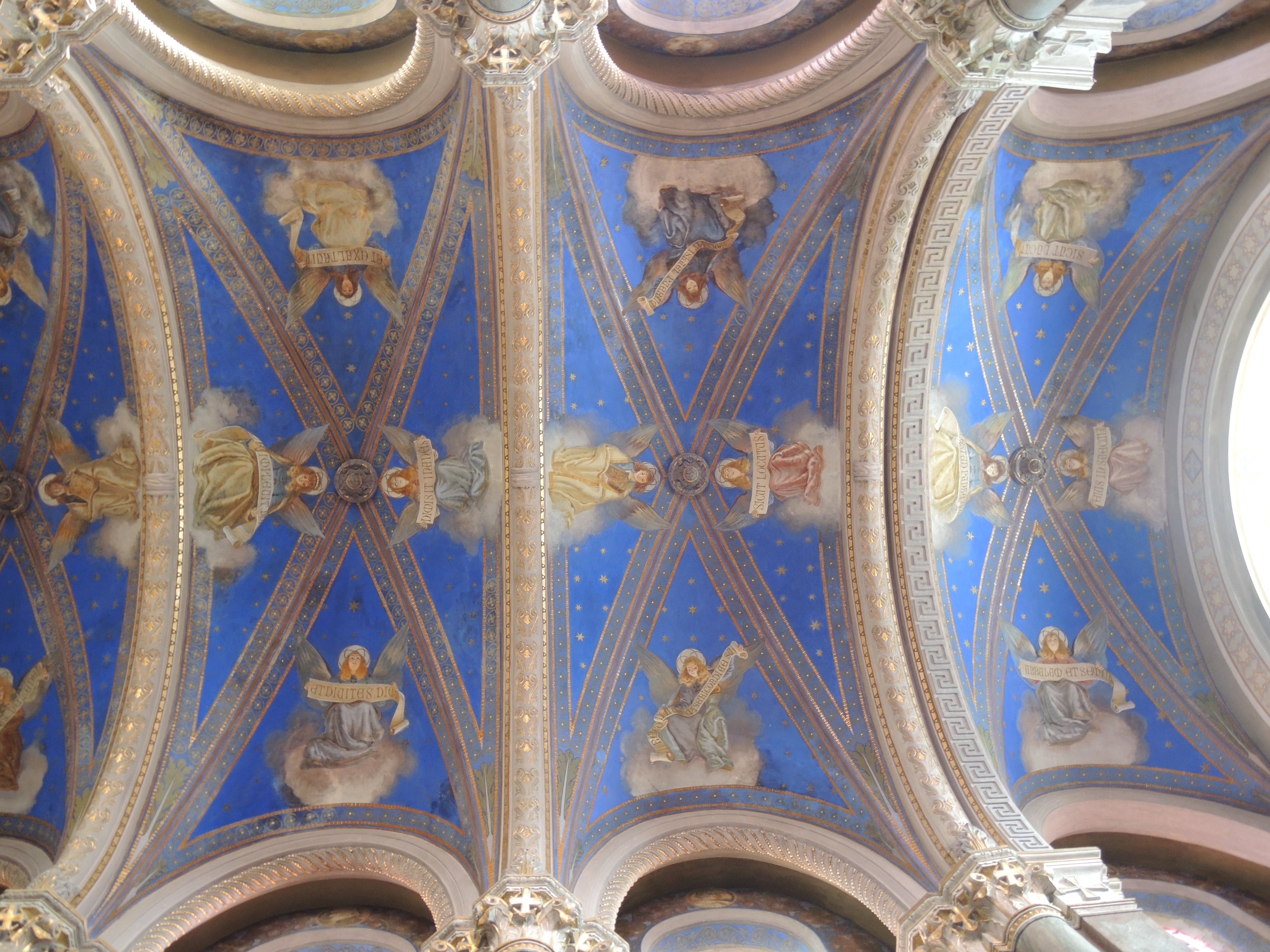 Monteodorisio: Santuario della Madonna delle Grazie